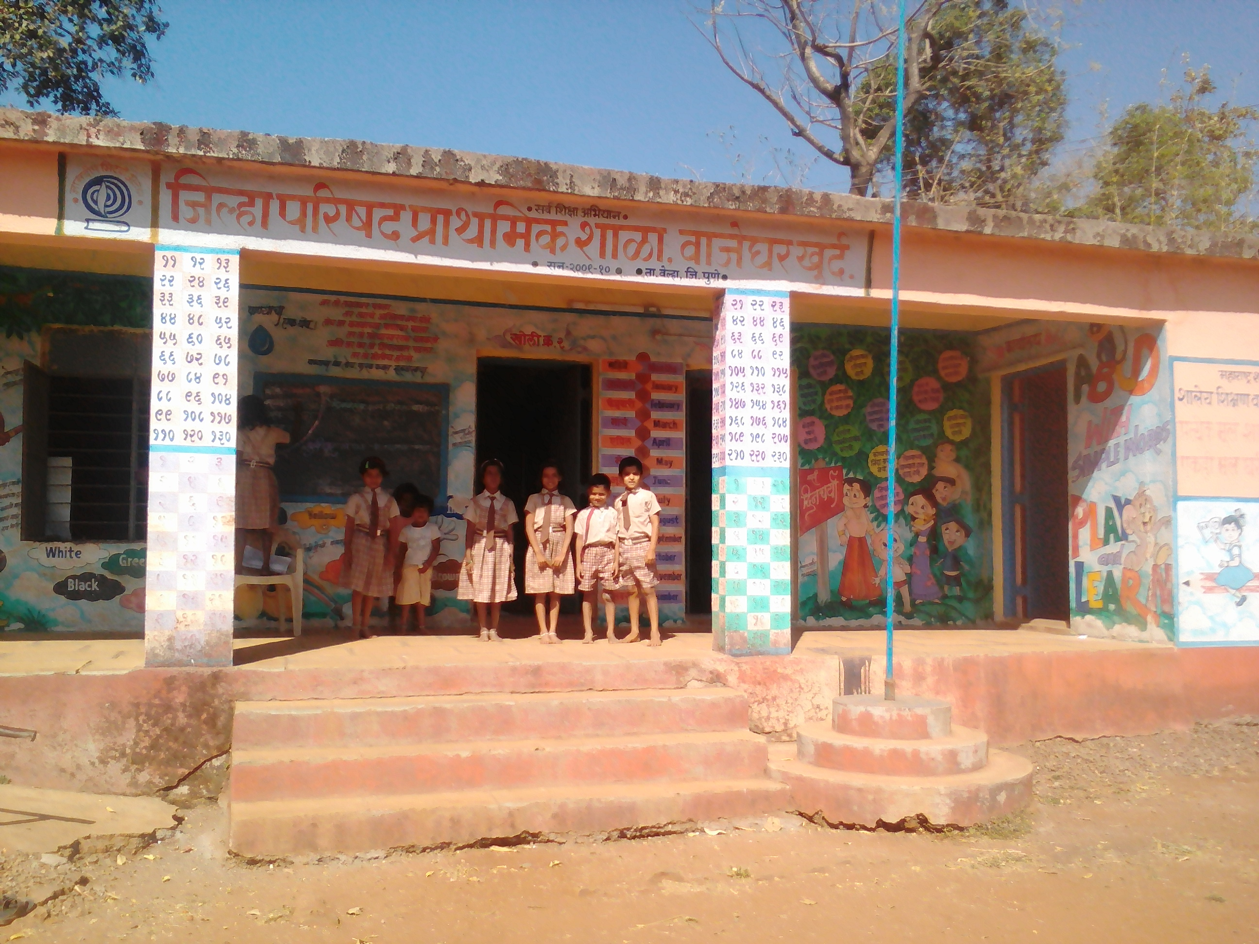 जिल्हा परिषद प्राथमिक शाळा वाजेघर खुर्द